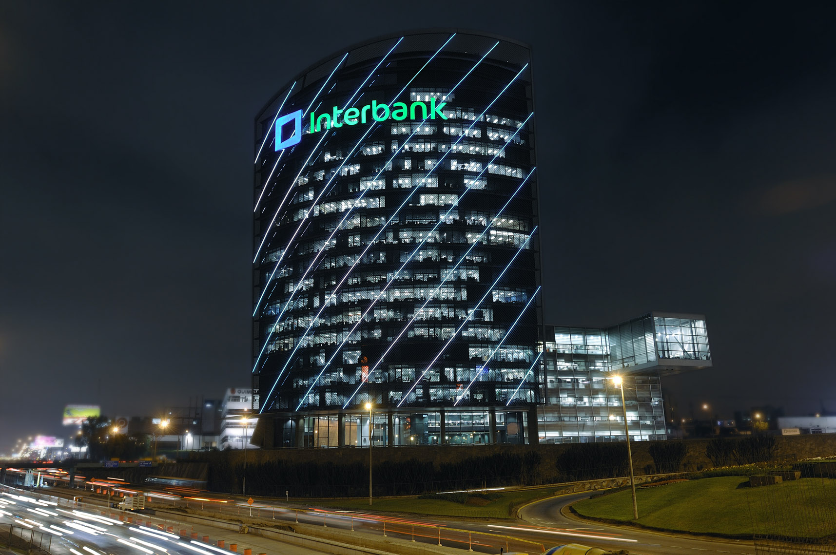 Torre Interbank